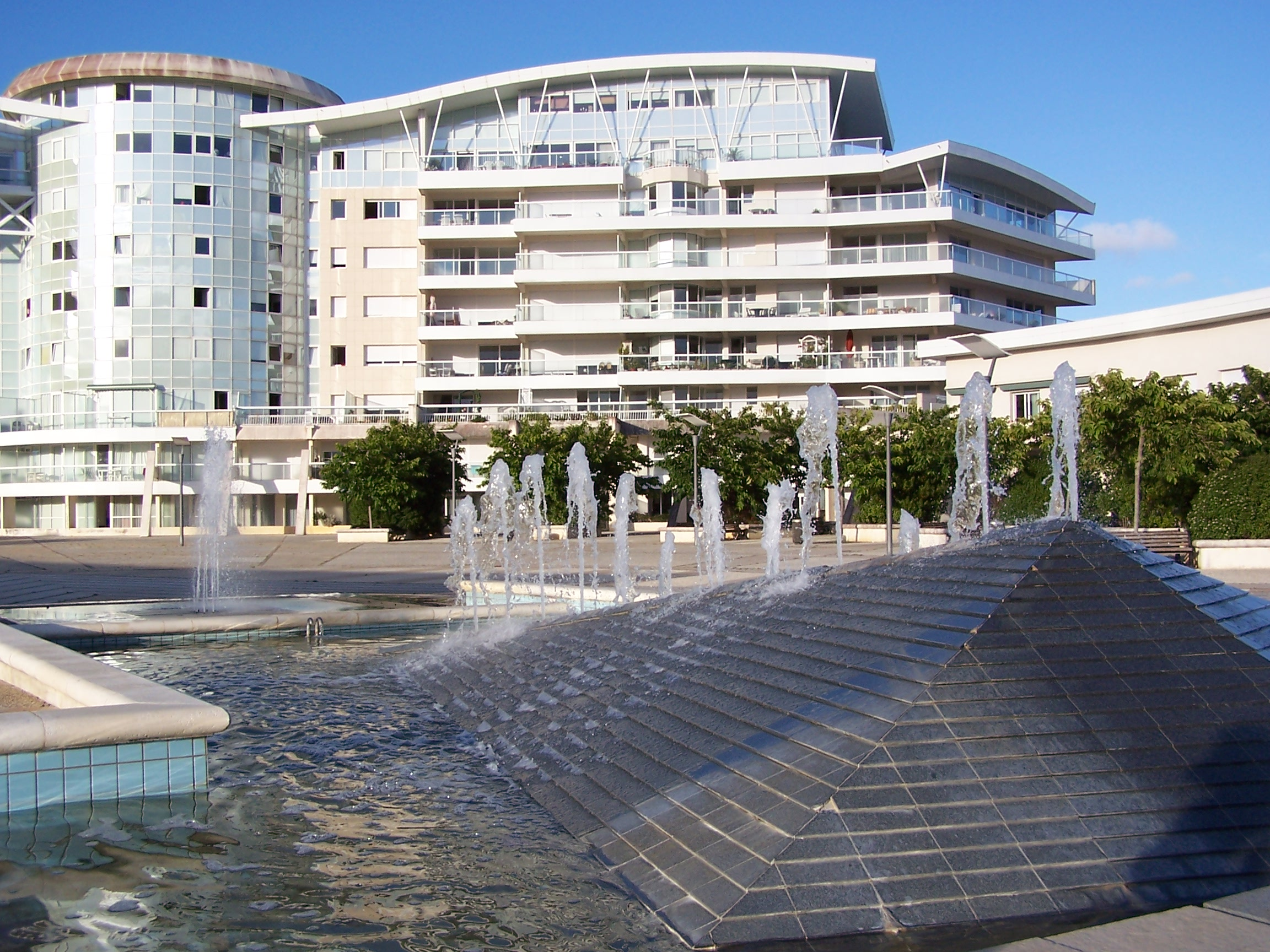 Photographie de la résidence Porte Océane, prise sur les bords de mer, aux Minimes, à La Rochelle, en Charente-Maritime.